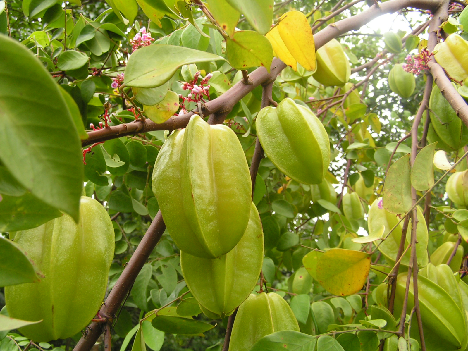 balingbing in Ubay, Bohol